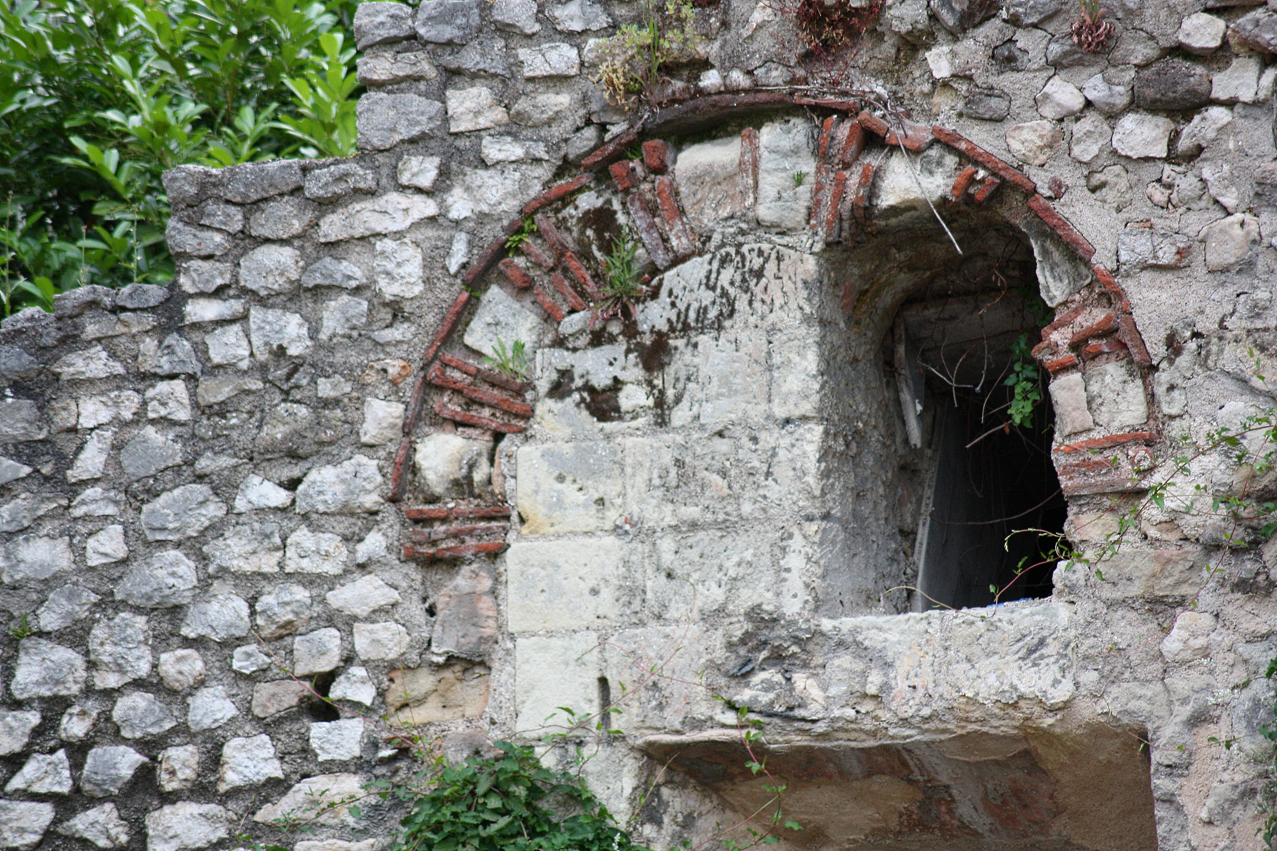 Détail préroman